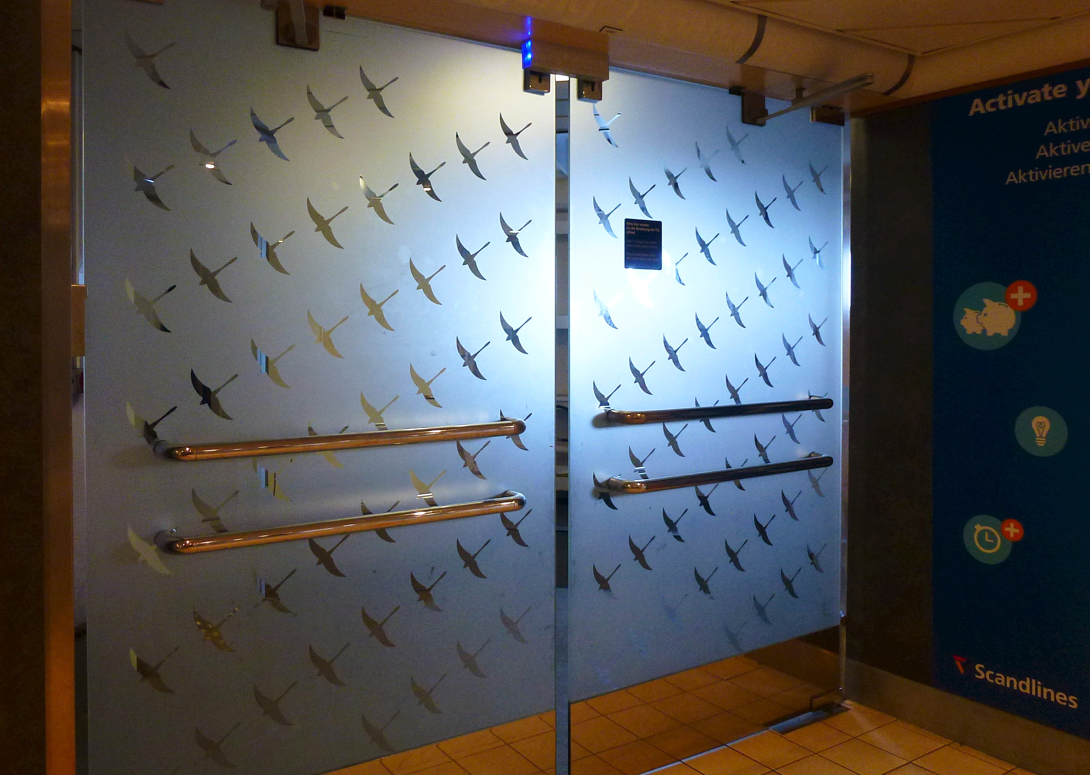 Bil- och tågfärjan Schleswig-Holstein, glasdörr